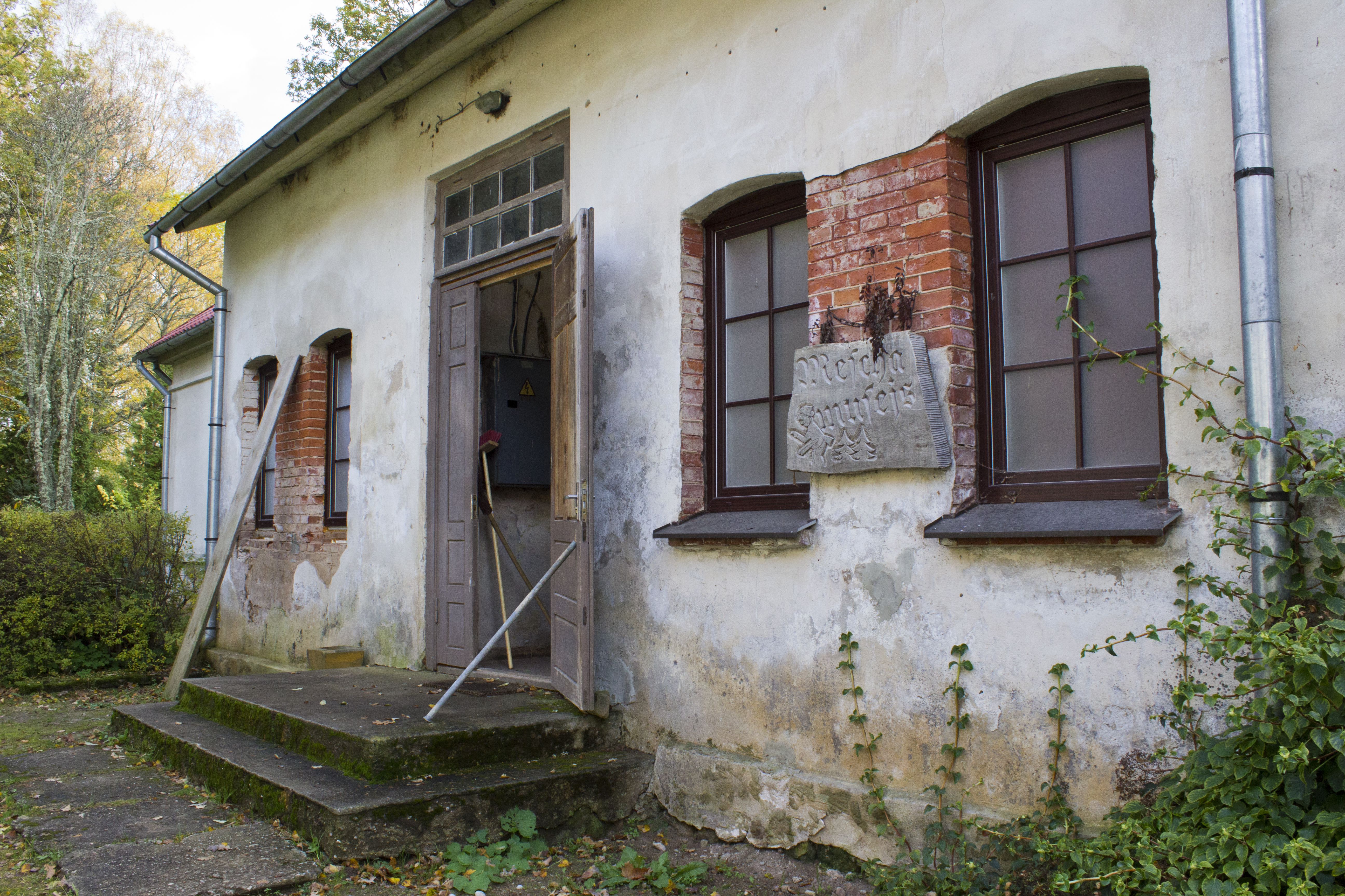 Valdemārpils leprozorijs / Meža muzejs